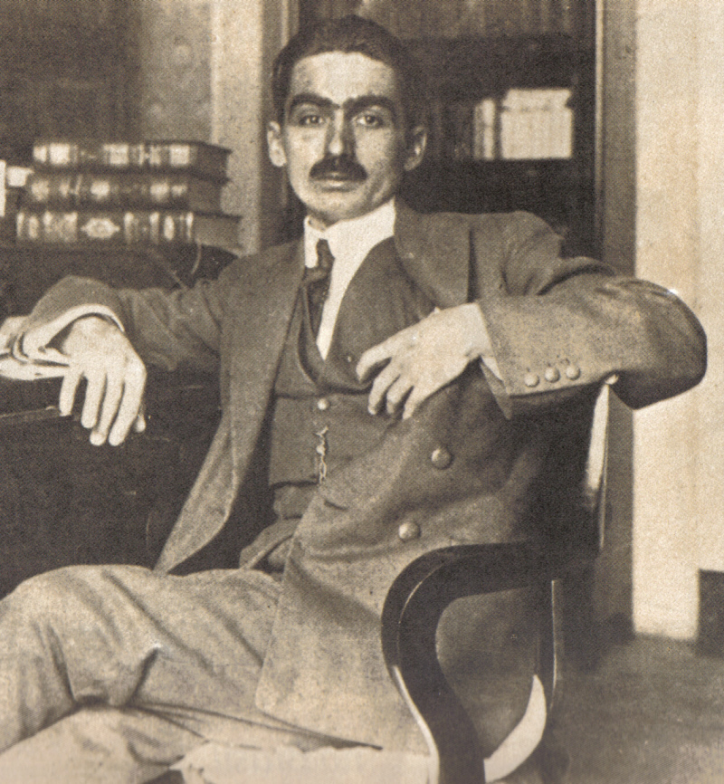 Autor brasileiro Monteiro Lobato